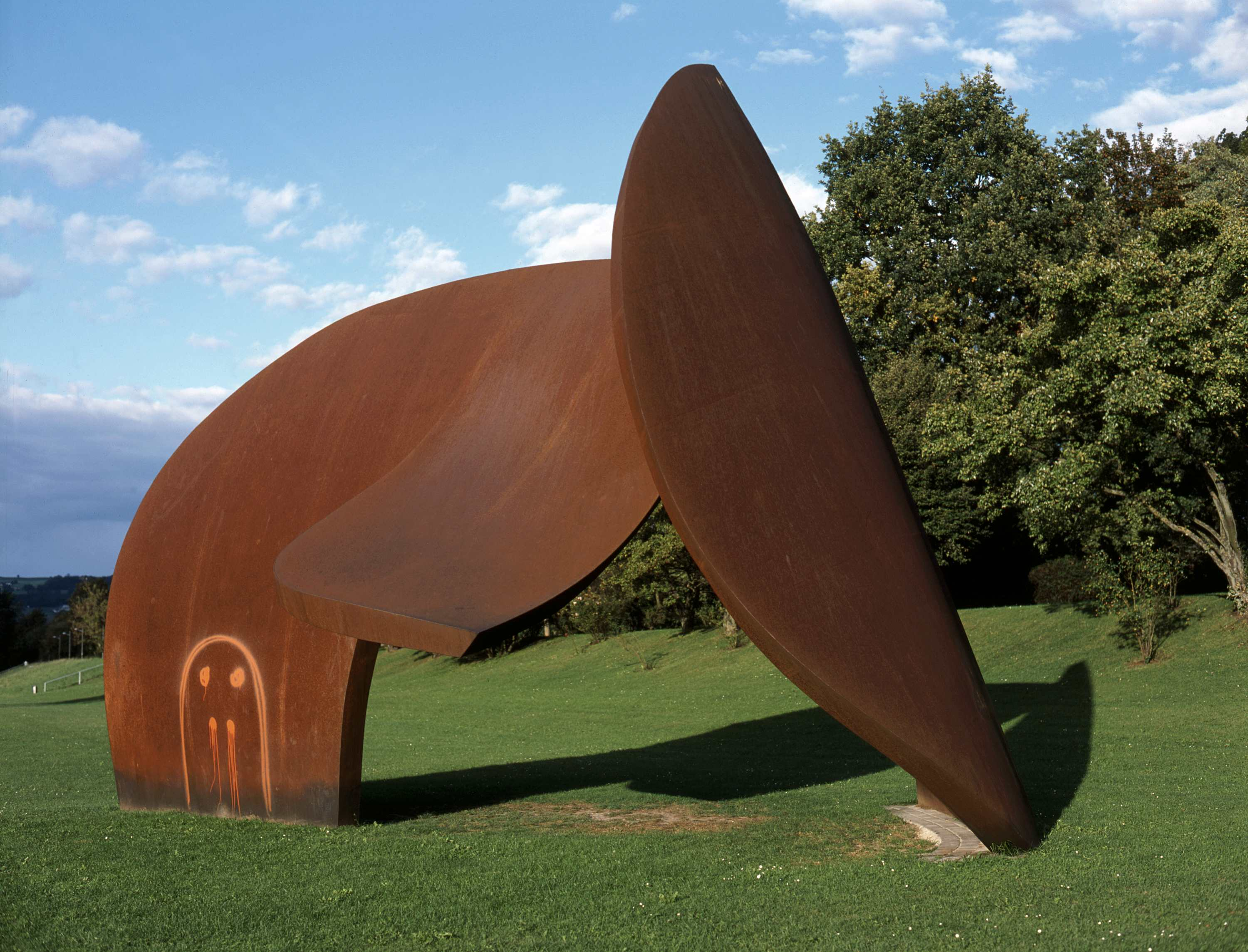 Sculpture at Donaulände Linz, 2007/Austria